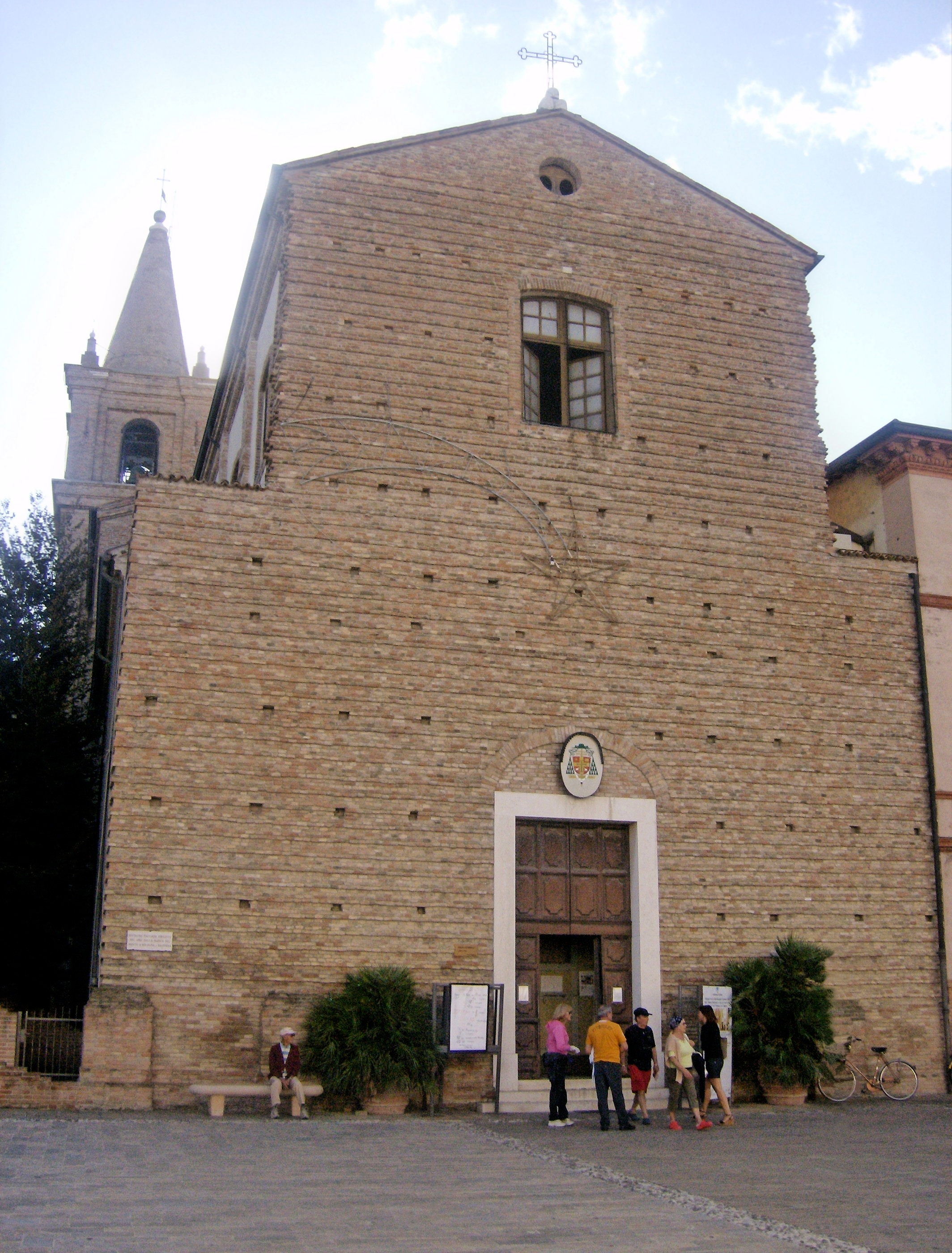 Cattedrale di Cervia